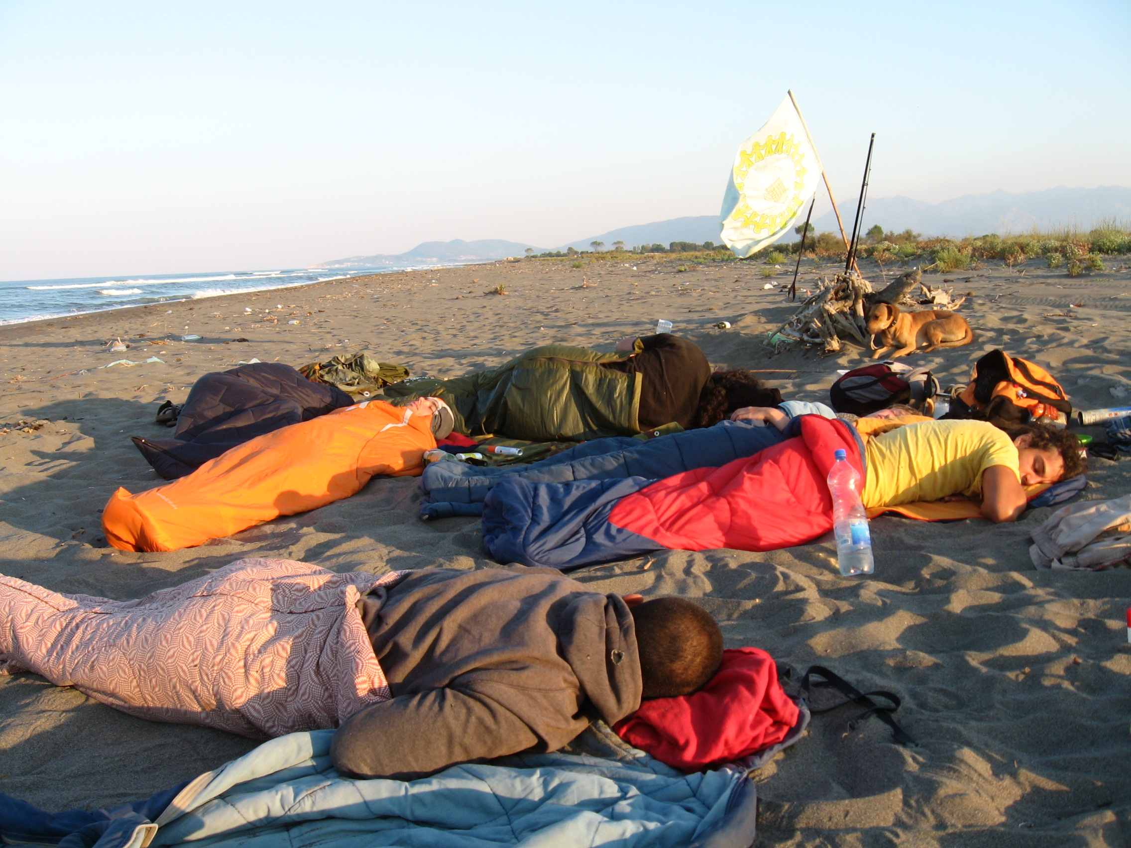 Kamperi na Adi Bojani.